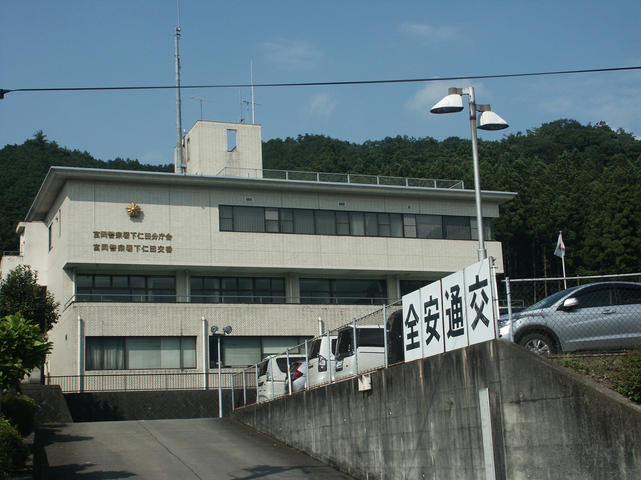 富岡警察署下仁田分庁舎（旧：下仁田警察署）